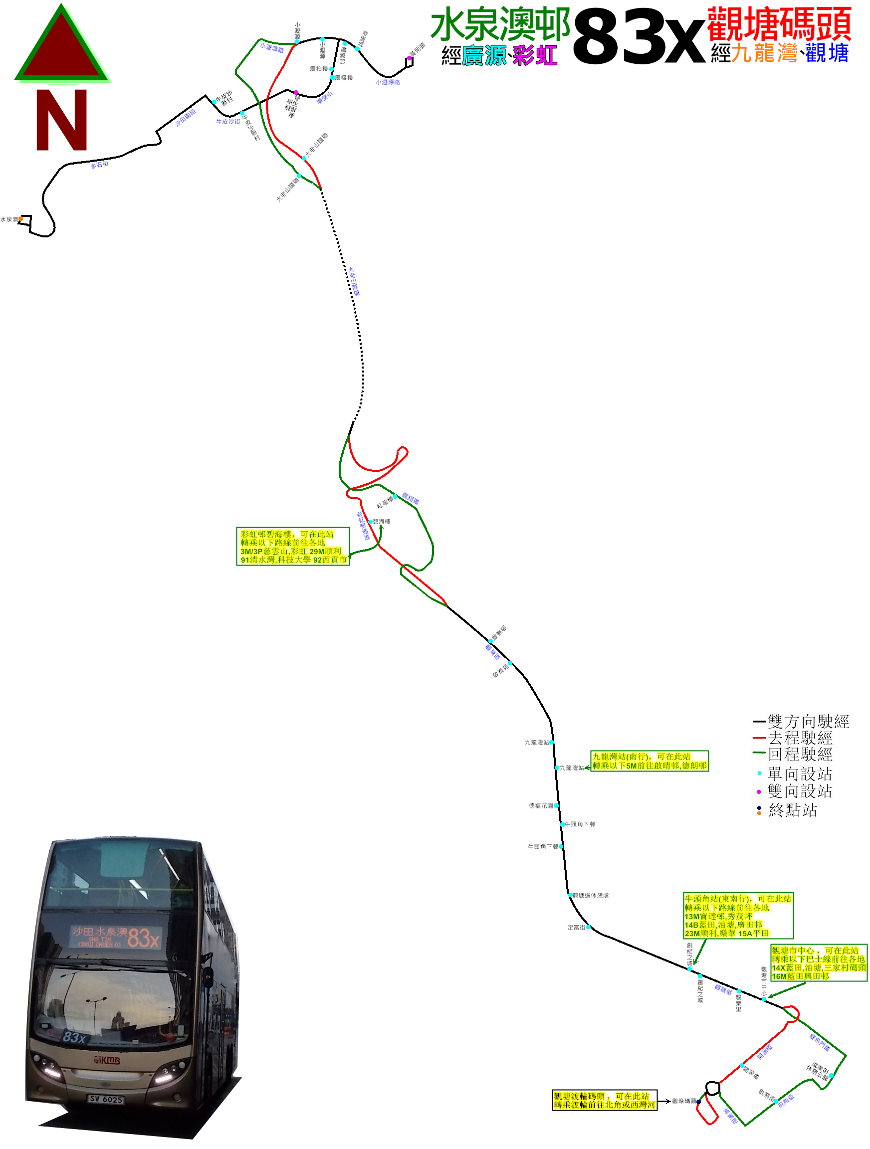 中文（香港）: 九巴83X線的走線圖